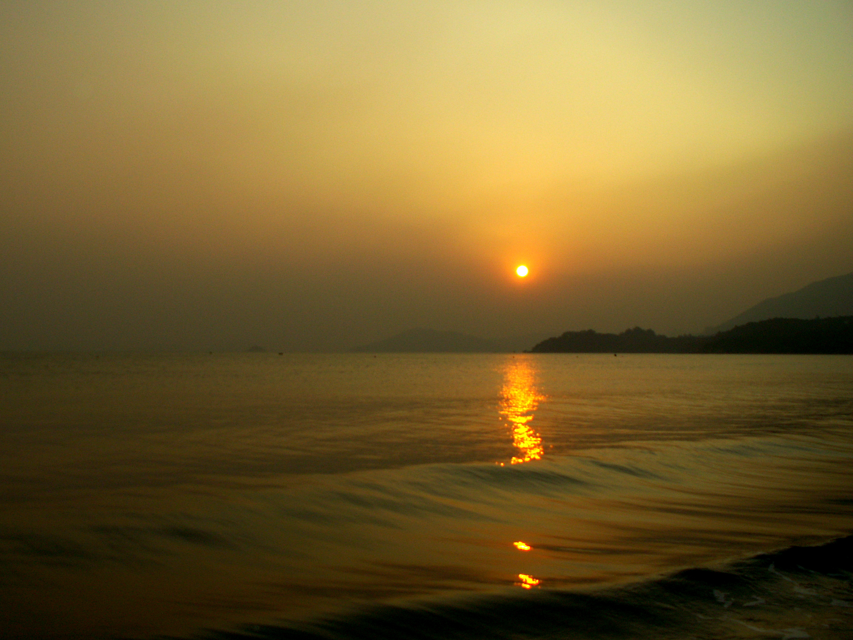 在香港貝澳露營時，拍下日落的照片。